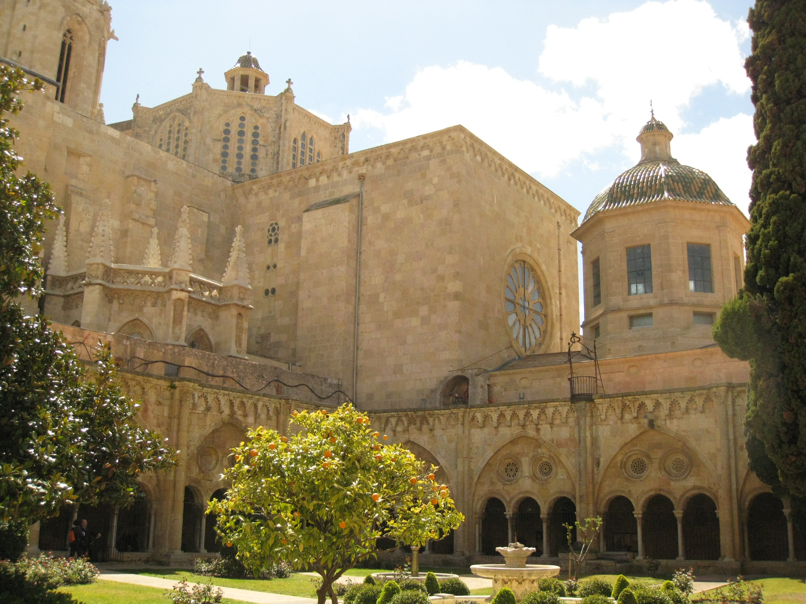 Catedral de Santa Maria (Tarragona)